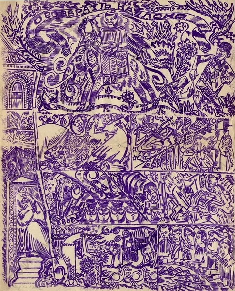 Михаил Ле-Дантю. О возврате на лоно. Рисунок для 17-го (нумерация по списку Ольги Лешковой) выпуска журнала "О возврате на лоно" (осень 1916). Единственно известное на 2013 год изображение Николая Янкина.